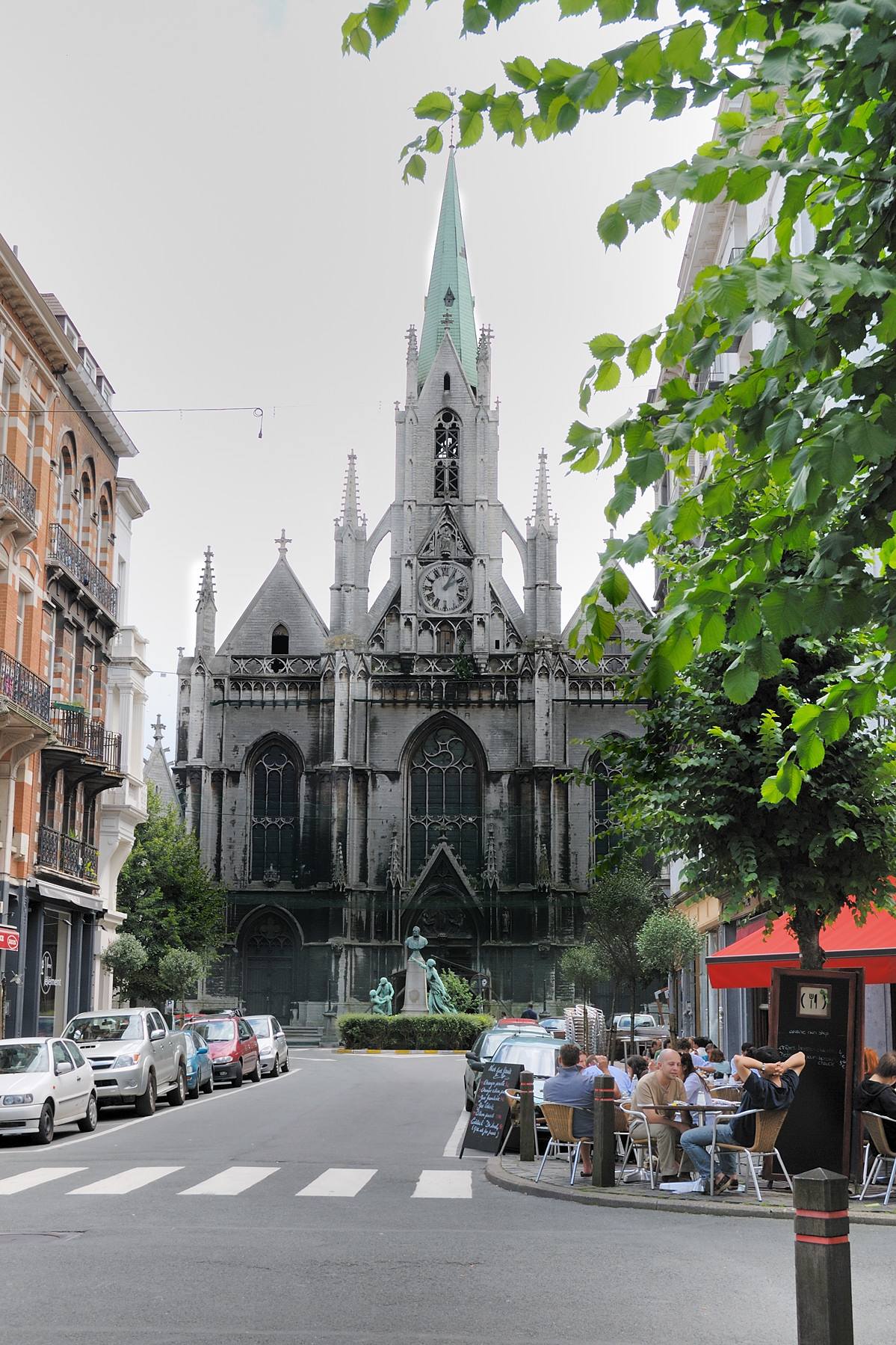 Eglise St Boniface, Ixelles (Brussels), Belgium